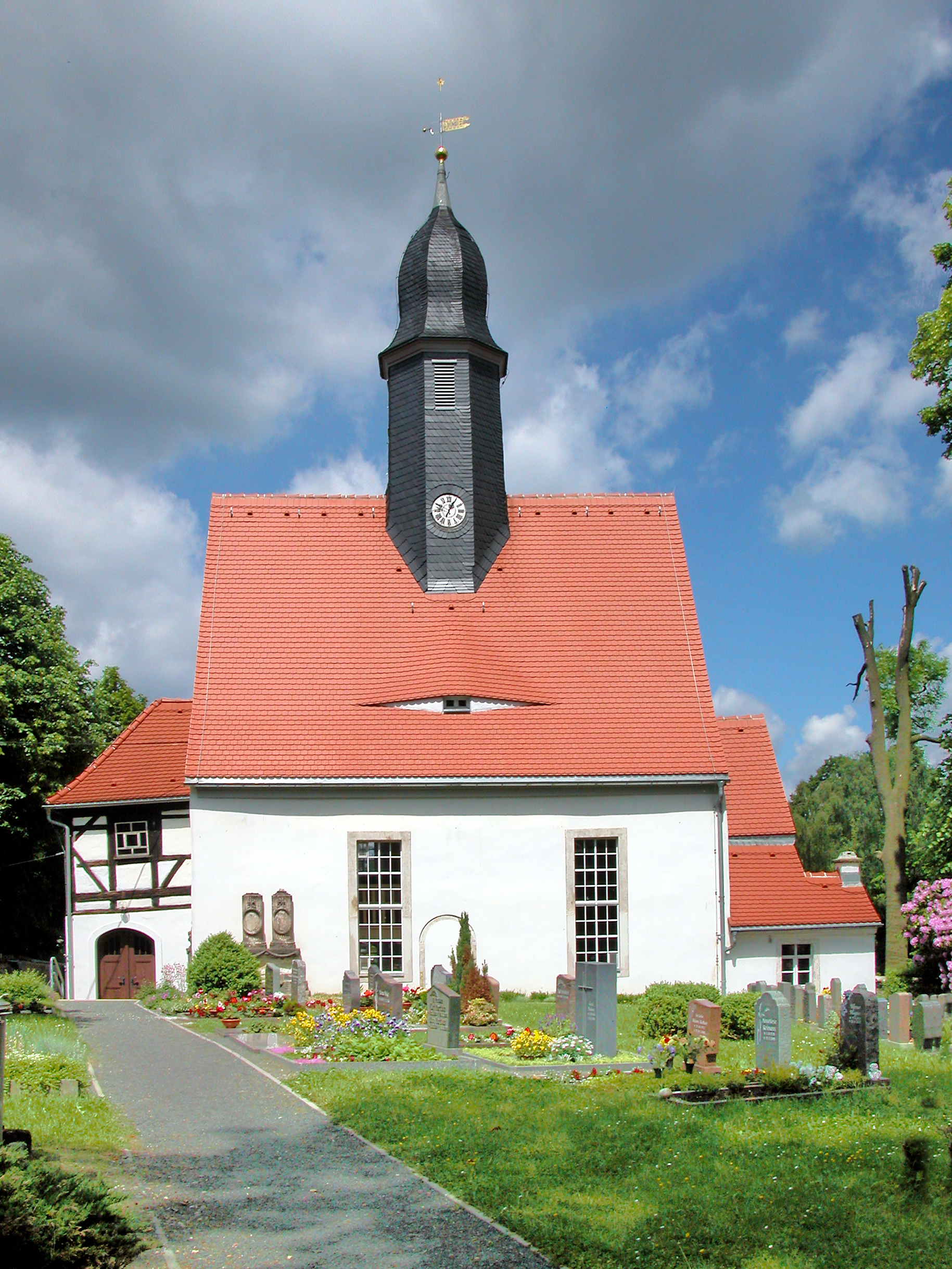 23.05.2009 09633 Oberschaar (Halsbrücke), Dittmannsdorfer Straße (GMP: 50.980835,13.408329): Dorfkirche, im Kern mittelalterlich. [DSCN37674.TIF]20090523245DR.JPG(c)Blobelt